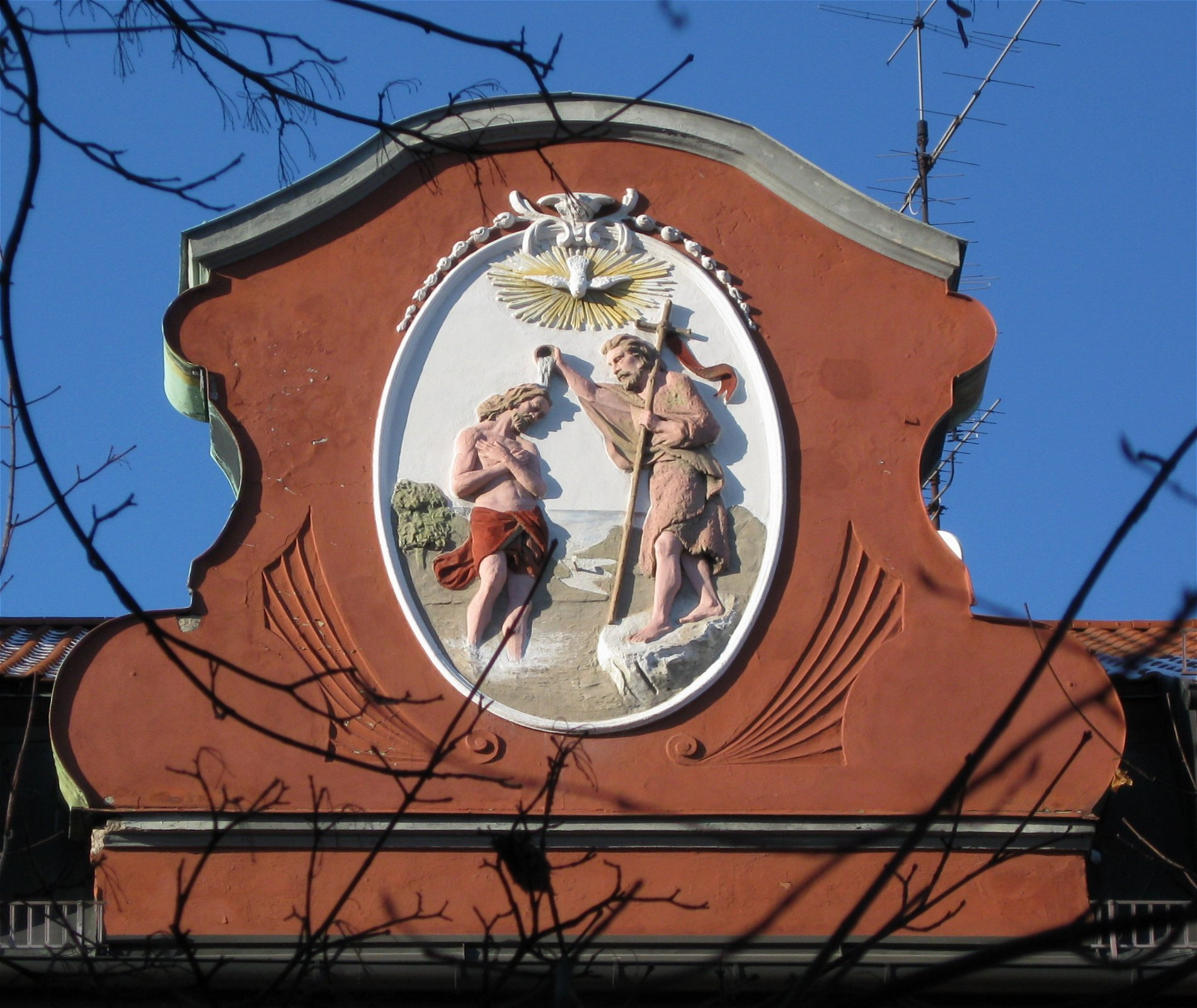 Johannisplatz 23; Mietshaus, neubarock, mit Erker und Giebelrelief, um 1900